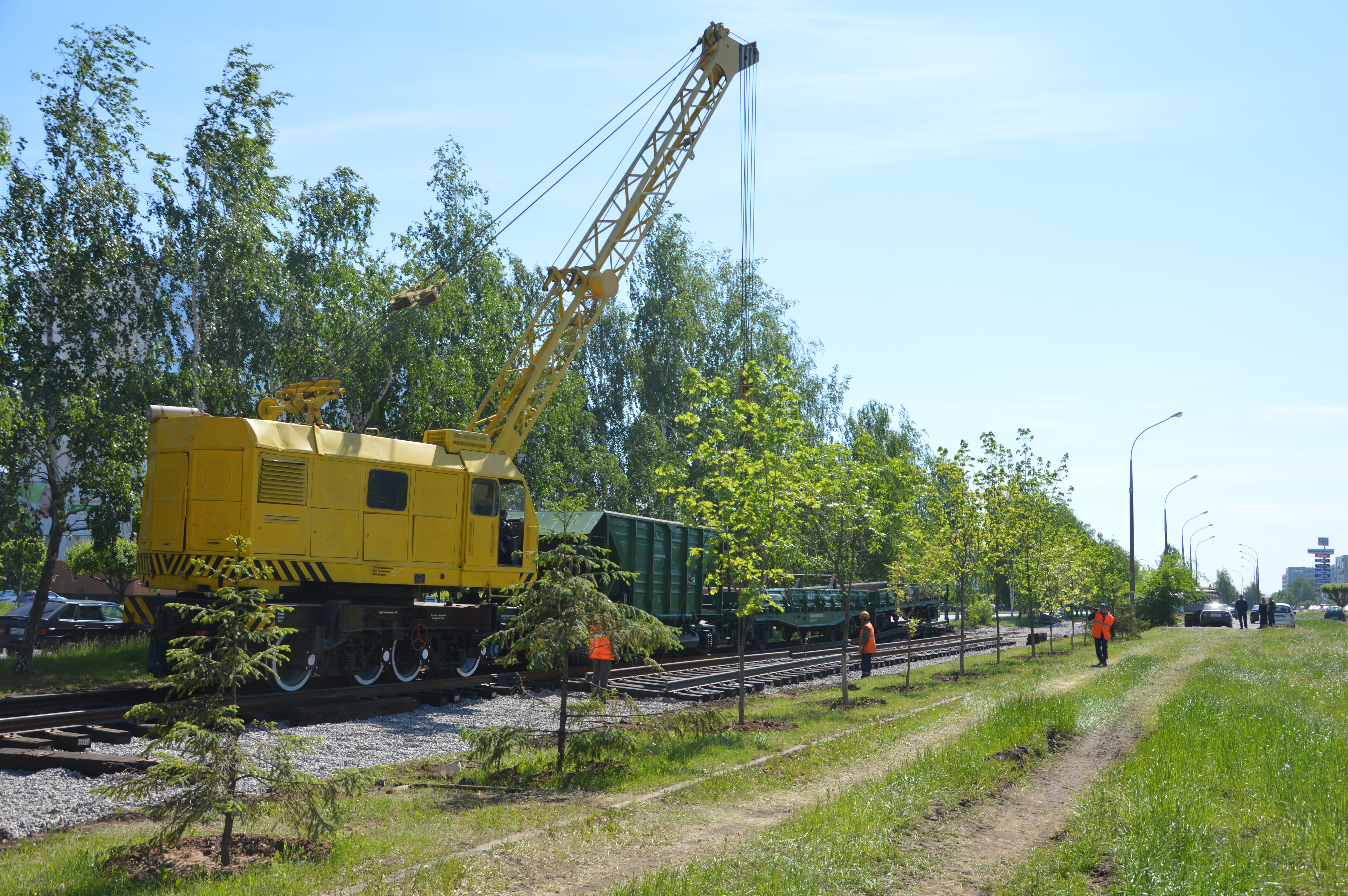 Строительство новой 6-ти километровой трамвайной линии в Набережных Челнах